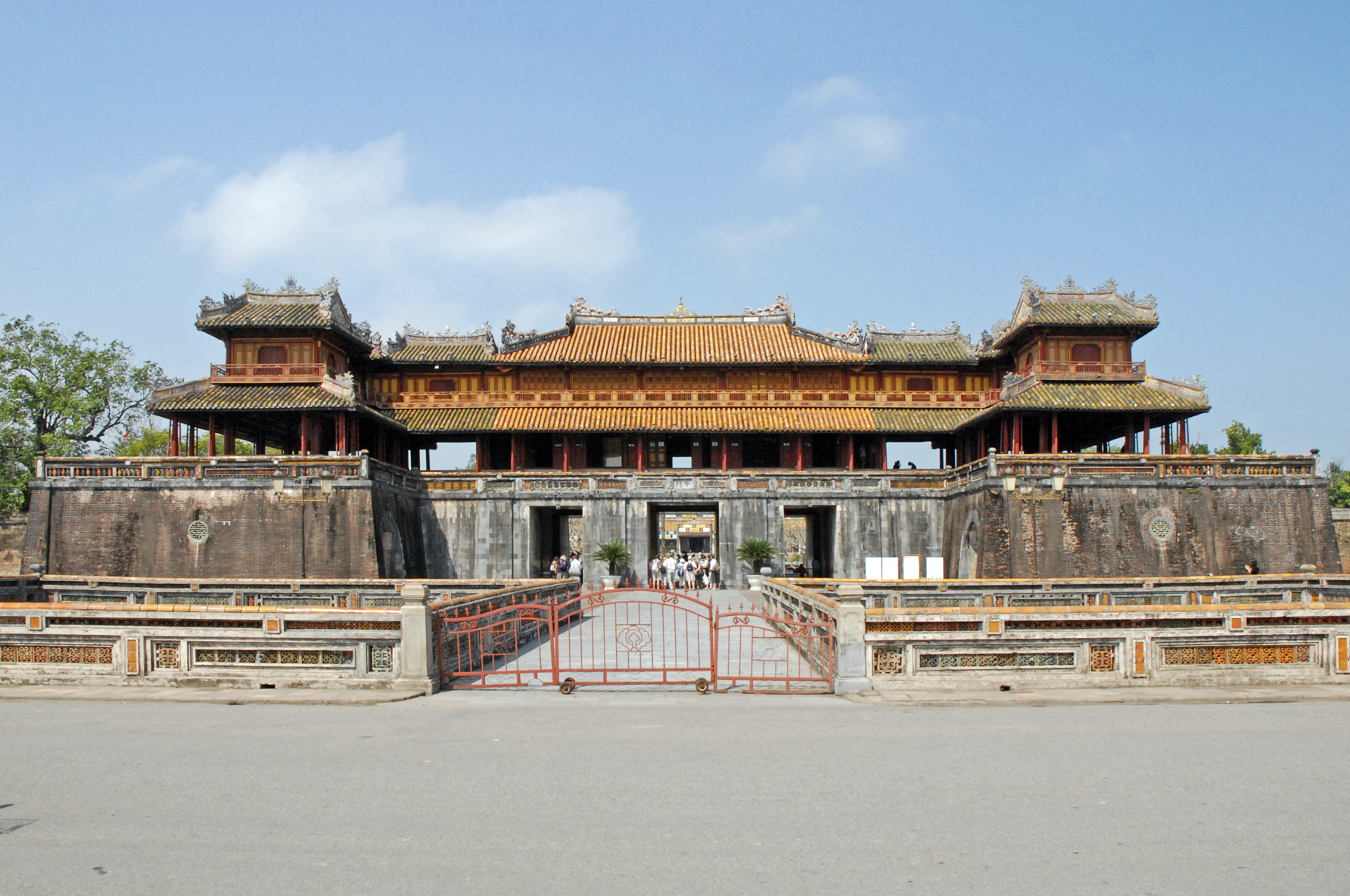 La porte du midi est l'entrée principale de la cité impériale. Le portail central était réservé au souverain, le toit en surplomb est recouvert de tuiles jaunes, la couleur impériale. La porte est surmontée par le pavillon des Cinq Phénix.